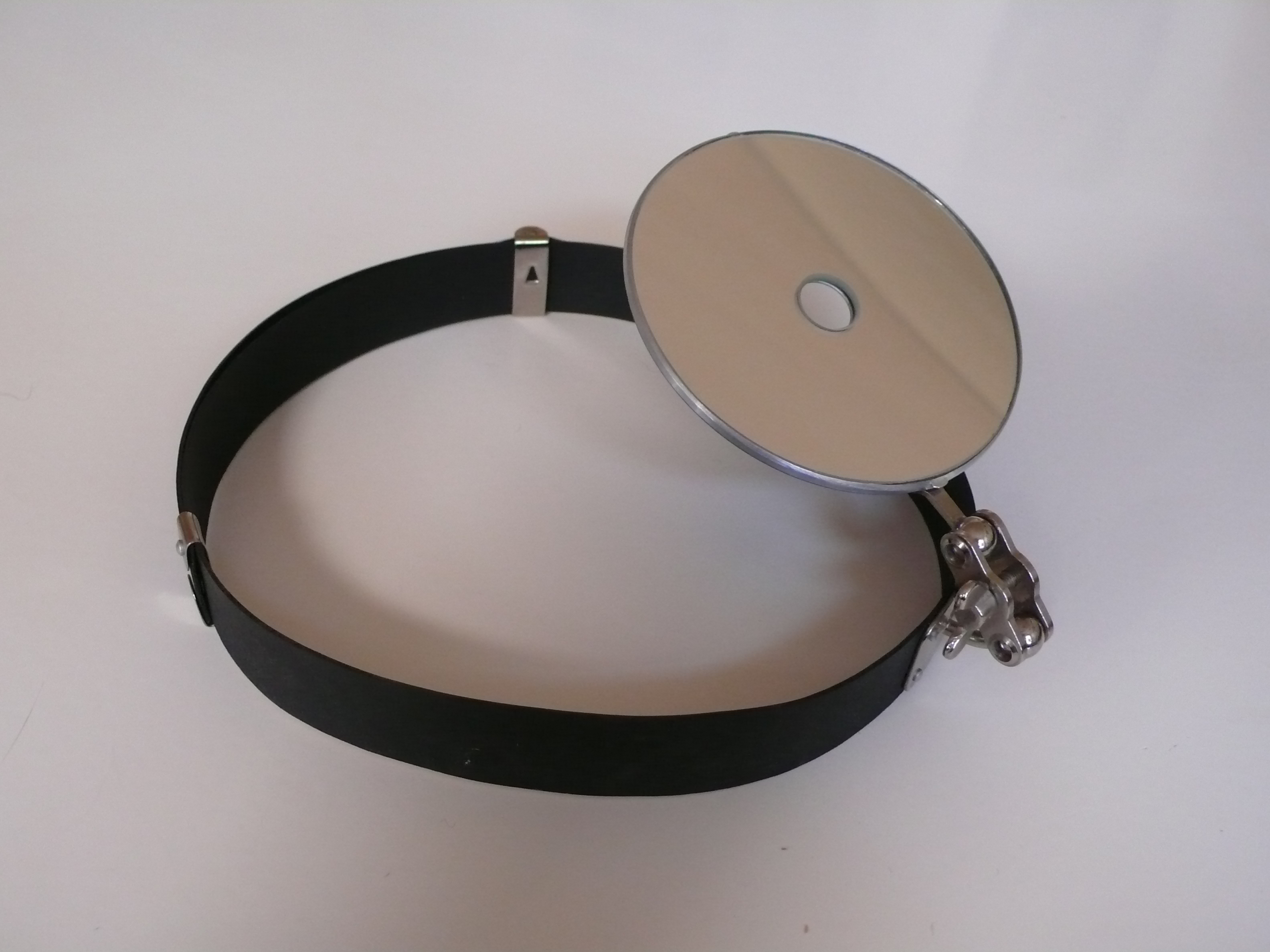 Stirnspiegel der Hals-Nasen-Ohren-Heilkunde